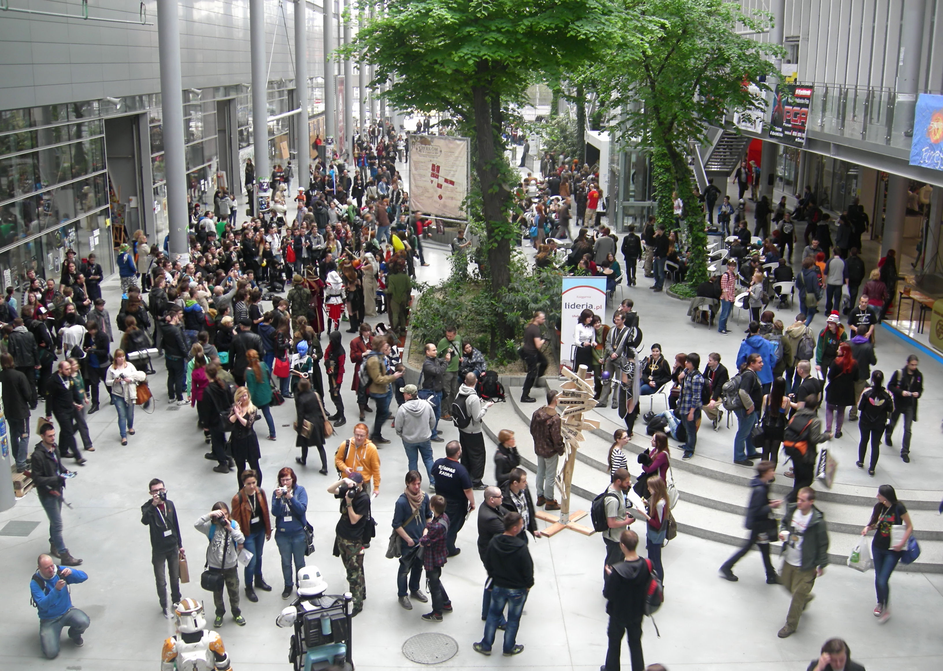 Hol główny podczas Festiwalu Fantastyki Pyrkon 2014